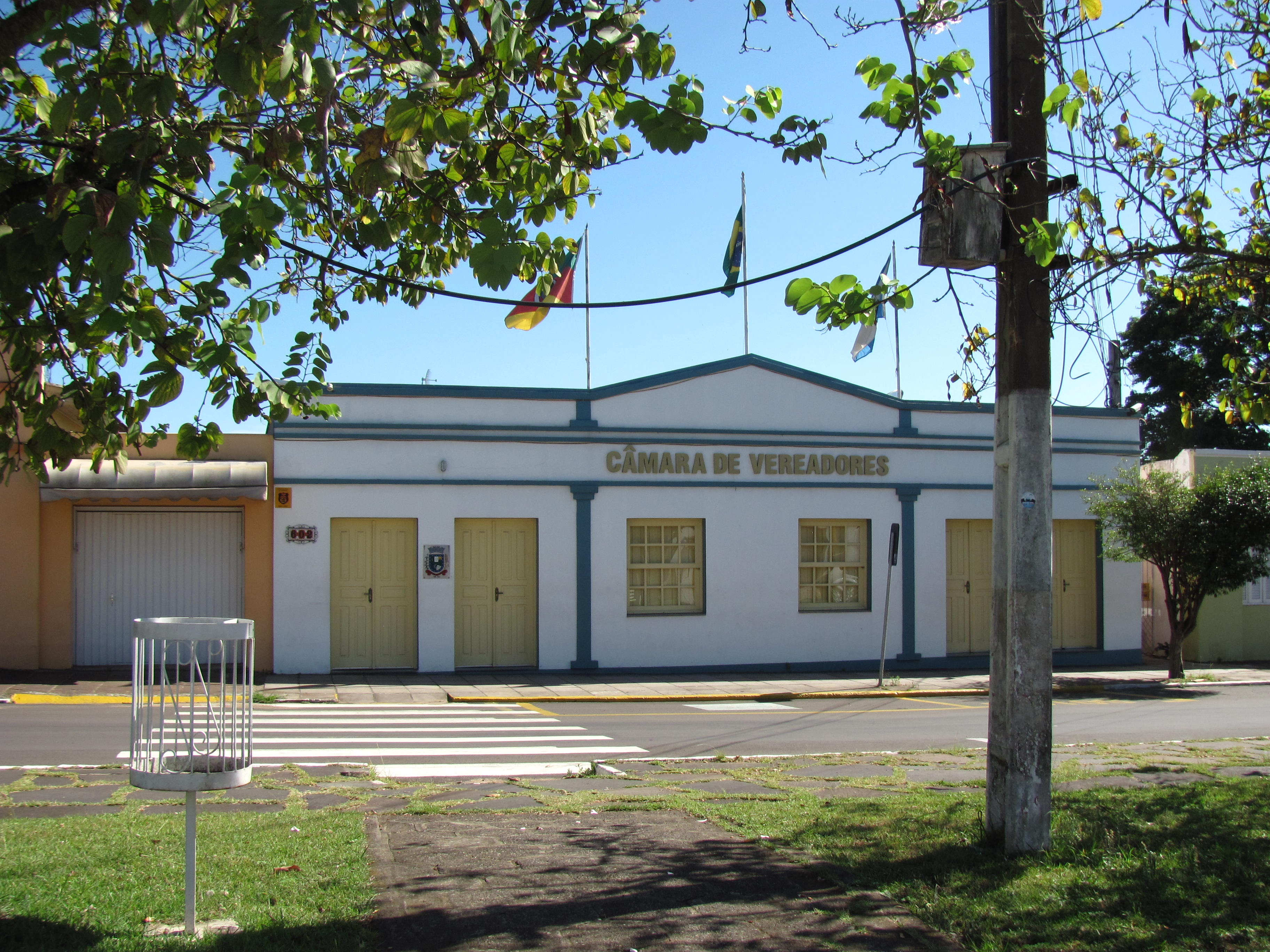 Câmara de vereadores de Santo Antônio da Patrulha